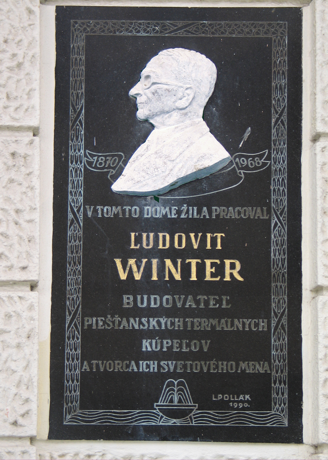 Pamätná tabuľa zakladateľovi kúpeľov v Piešťanoch